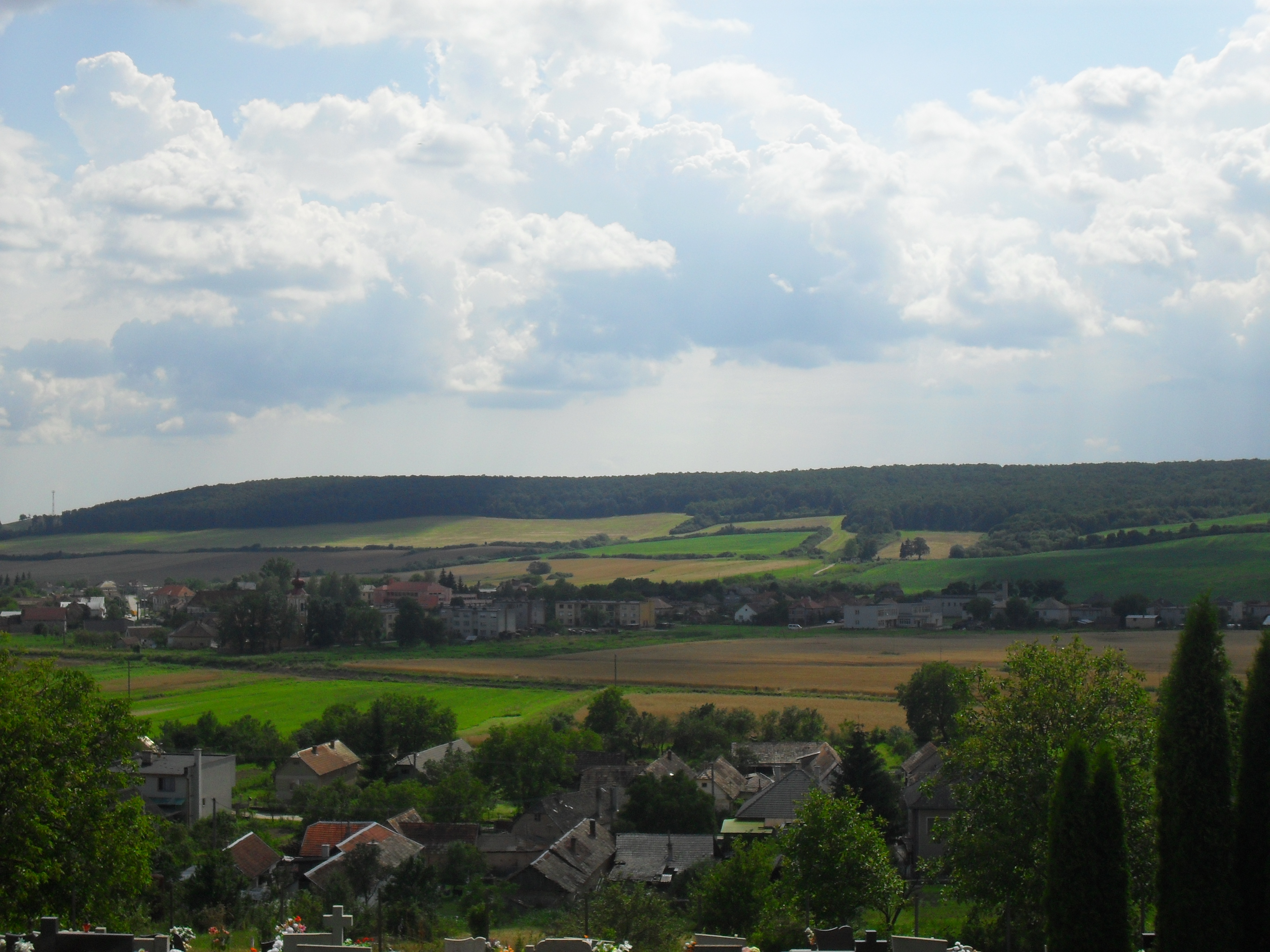 Gömörfalva - látkép a sánkfalvi temetőből (előtérben Sánkfalva, háttérben Harkács)